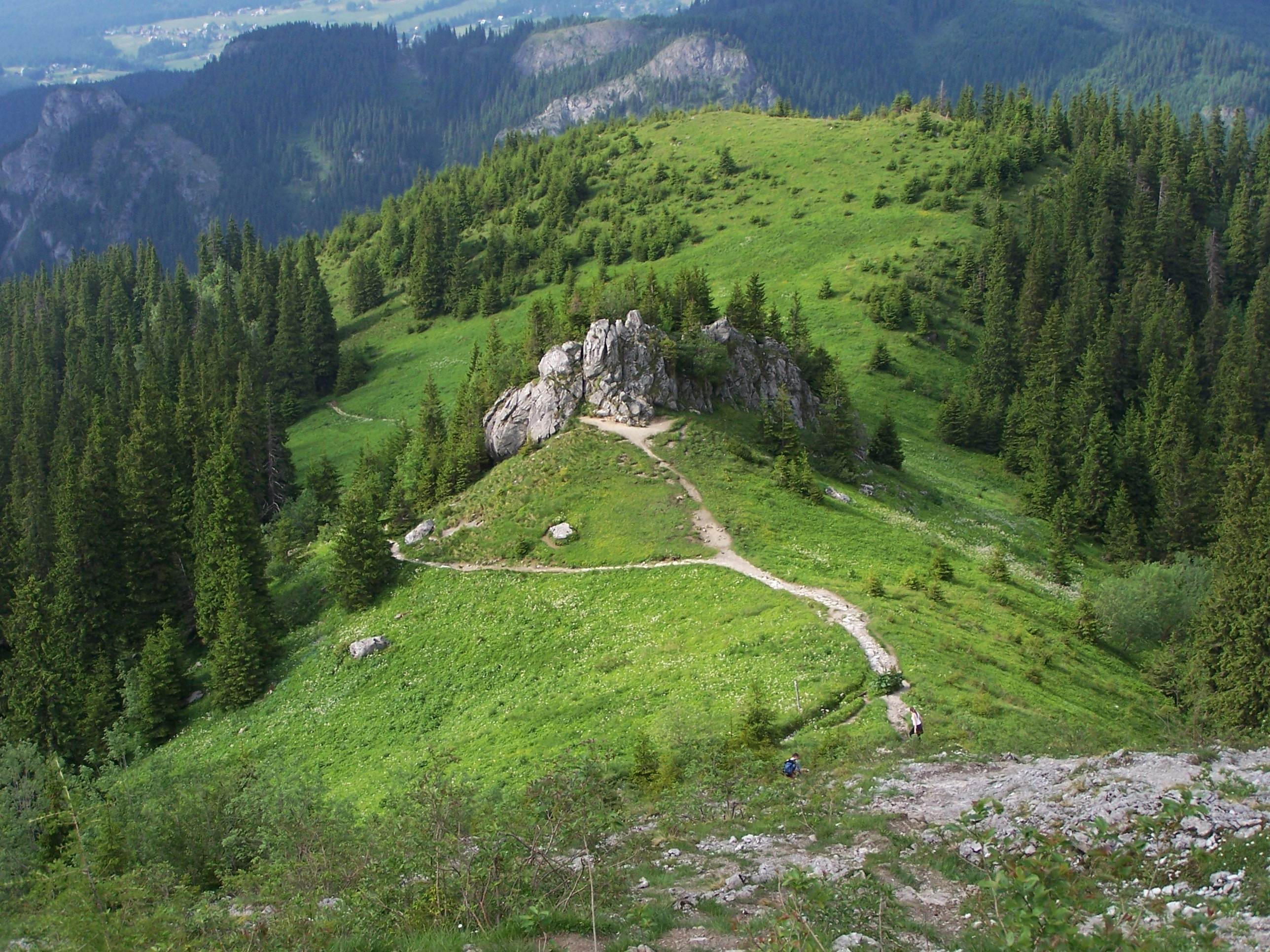 Skała Piec (Hala Upłaz - West Tatra Mountains)